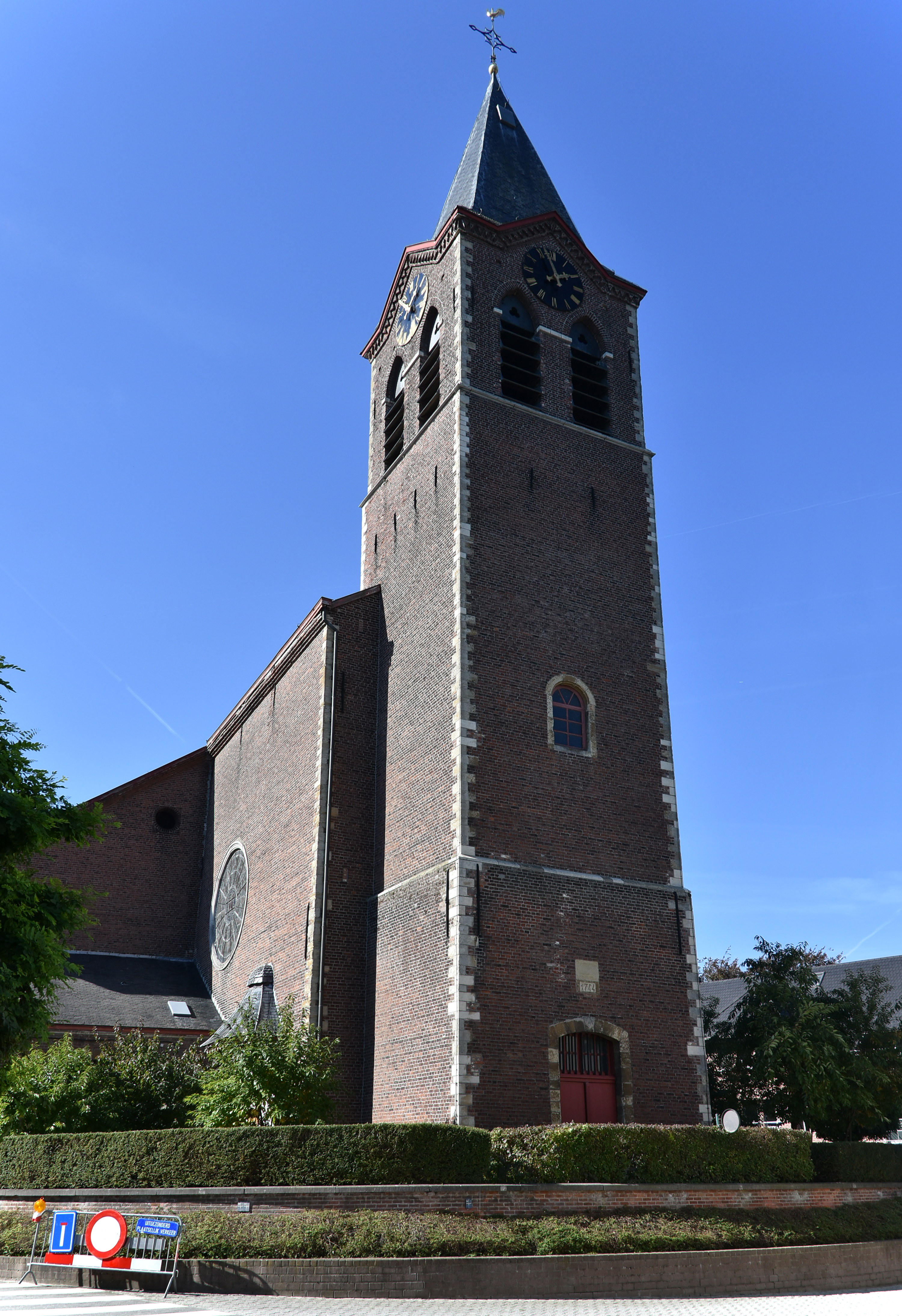 Sint-Bavokerk (Mere) kerktoren 5-10-2018 This photo of immovable heritage has been taken in the Flemish Region